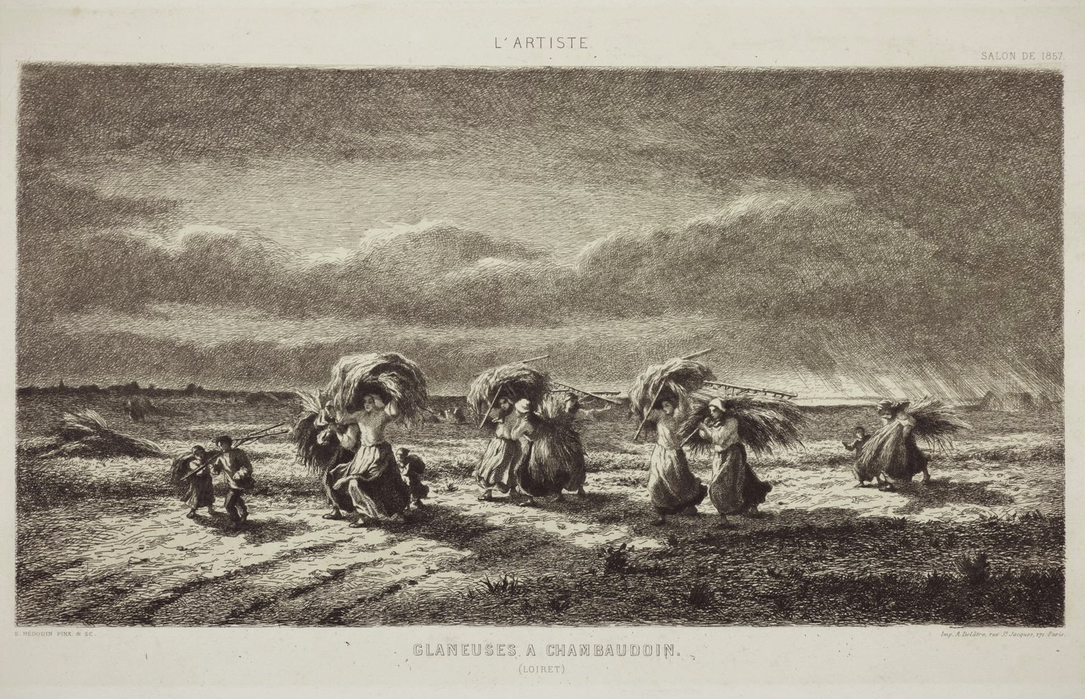 une reproduction en estampe du tableau d'Hédouin, Les Glaneuses à Chambaudouin, peint en 1857. Cette reproduction date de l'année suivante.